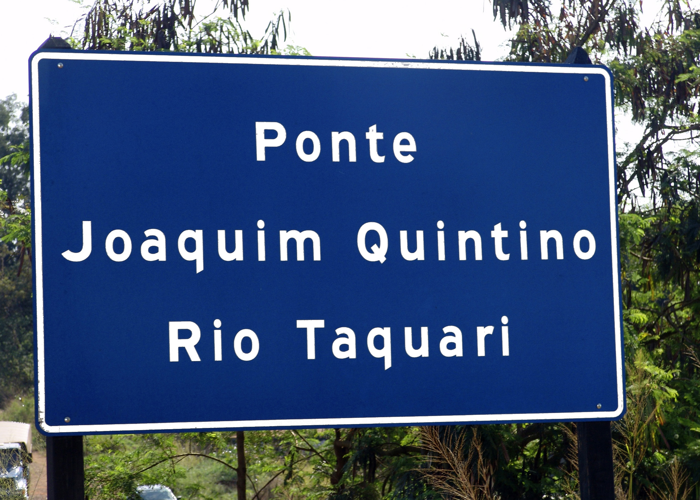 Rio Taquari (afluente do rio Paranapanema- Taquarituba, São Paulo, Brasil